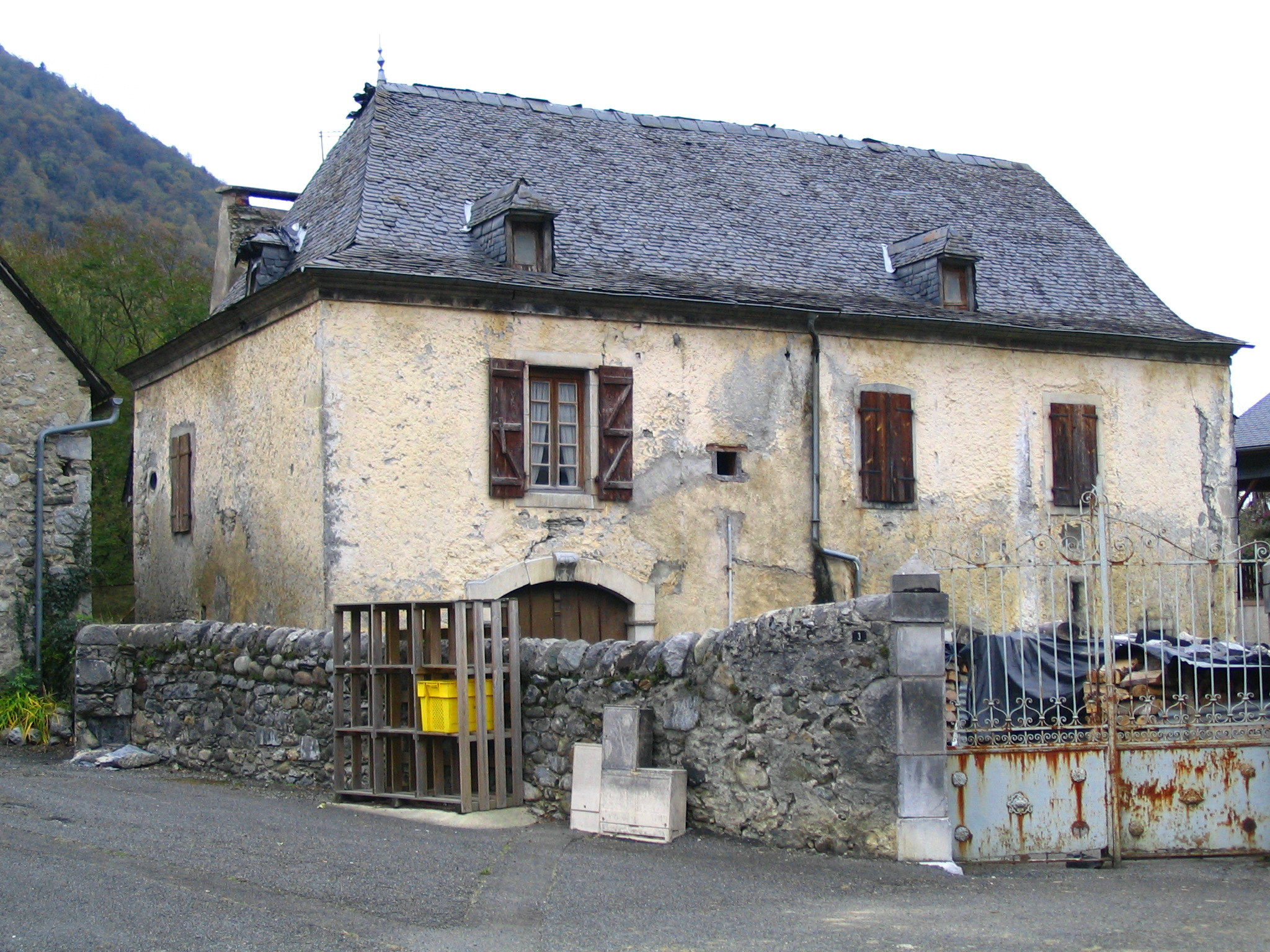 Village de Castet - Pyrénées Atlantiques - France